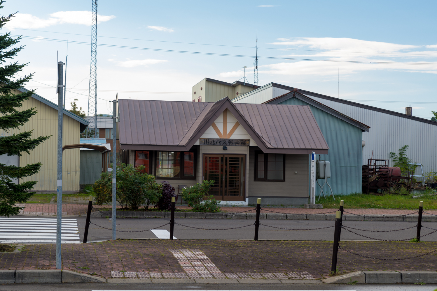 北海道旅客鉄道株式会社標津線川北駅跡地バス待合所